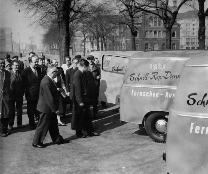 Zentralbild-Löwe Me-Qu 5.4.1960 Der Elektrokonferenz entgegen: Zehn Schnellreparaturwagen für Rundfunk und Fernsehen in Betrieb genommen Zehn Schnellreparaturwagen übergab der Hauptdirektor der VEB Rundfunk und Fernsehen, Heinze, am 2.4.1960 vor dem Dresdner Rathaus an den Rat der Stadt Dresden. Diese auf das praktischste ausgerüsteten Schnellreparaturwagen werden in der Stadt und im Bezirk Dresden für den Kunden- und Garantiedienst eingesetzt und tragen dazu bei, die reparaturkapazität zu vergrößern. In Berlin, wo mit der Einrichtung eines solchen mit Schnellreparaturwagen ausgerüsteten Kunden und Garantiedienstes der Anfang gemacht wurde, ist es gelungen, die durchschnittlichen Wartezeiten der Kunden von sechs Wochen auf zehn bis vierzehn Tage herabzumindern. UBz. Viele Dresdner begutachten die neue Wagen.